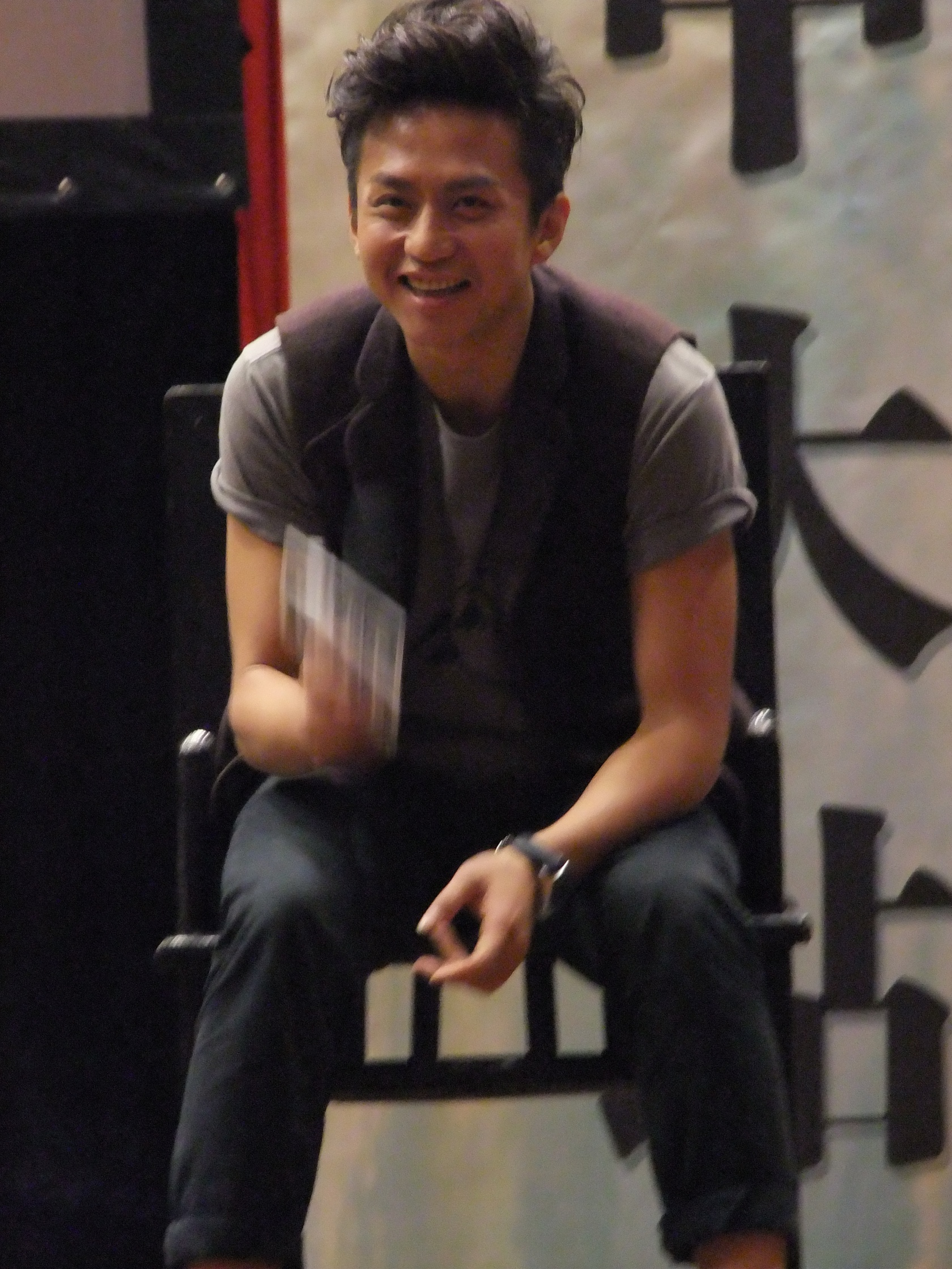 110925 电影《画壁》首映见面会 邓超.闫妮等 渣渣图